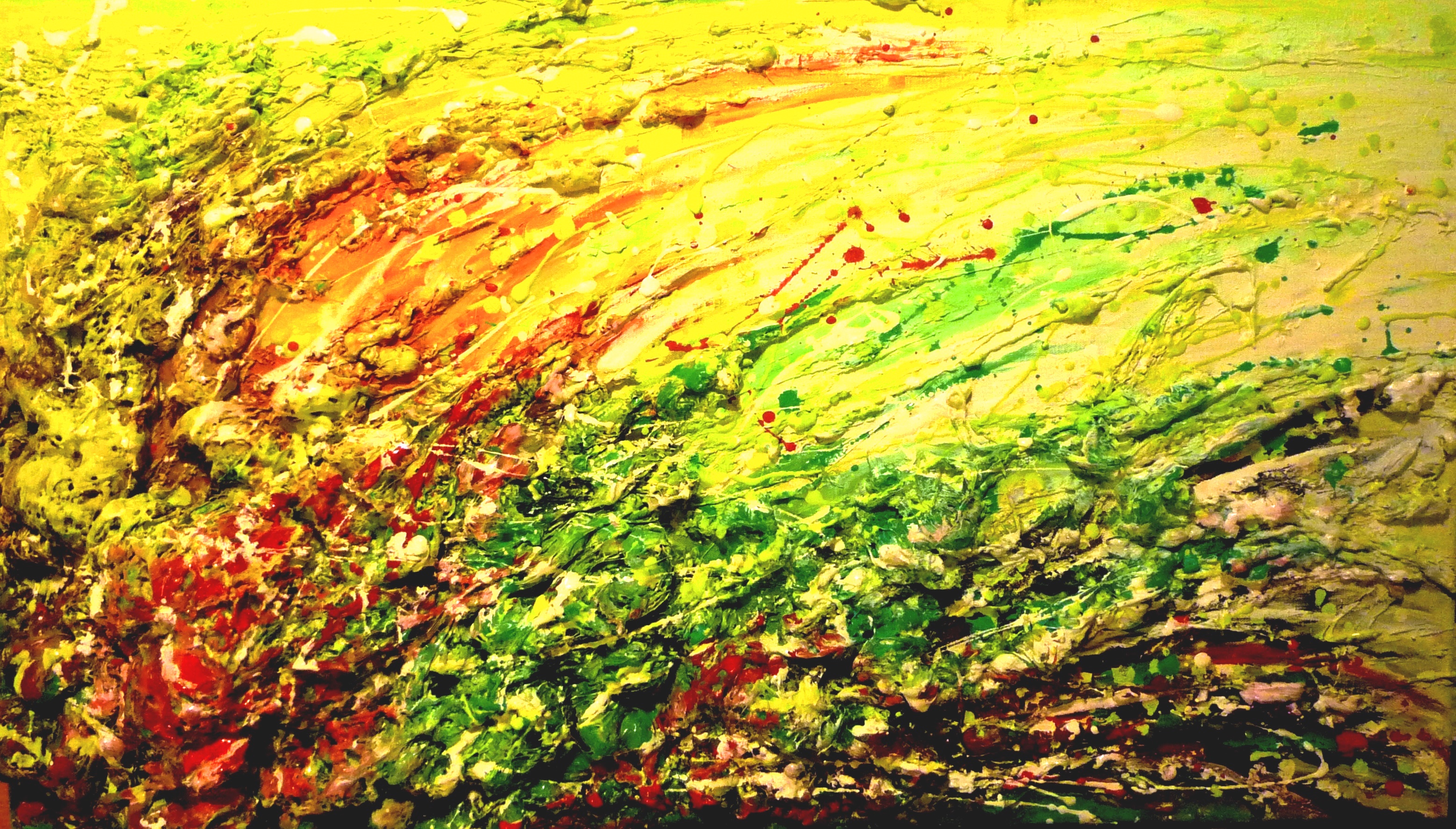 obraz, vytvořený pomocí pur-pěny a akrylových barev